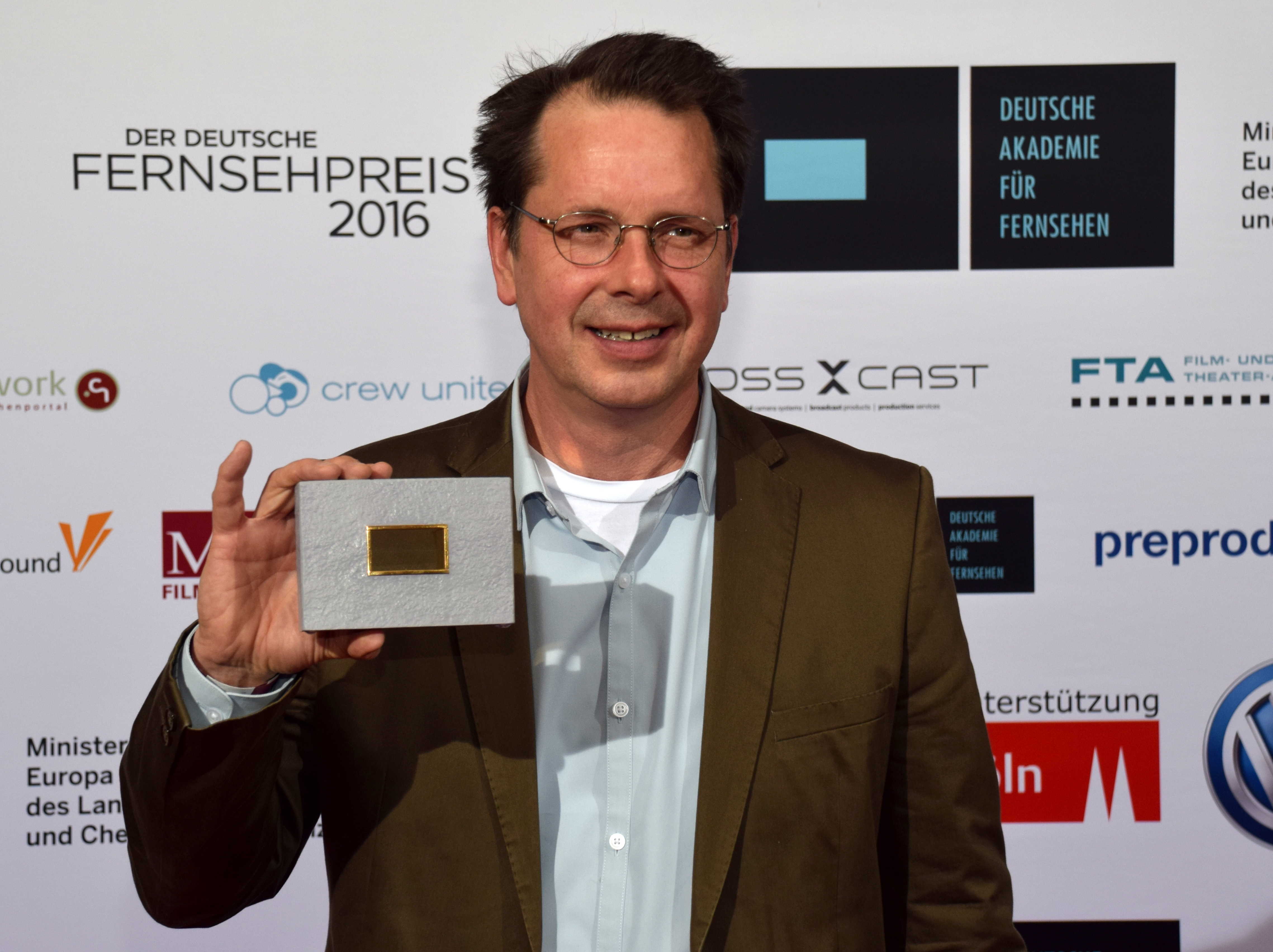 John Goetz (Journalist, Dokumentarfilmer "Jagd auf Snowden - Wie der Staatsfeind die USA blamierte) Deutsche Akademie für Fernsehen - Symposium und Preisverleihung 2015 in Köln